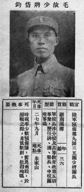 中文（台灣）: 抗戰軍人忠烈錄第一輯中的烈士遺像